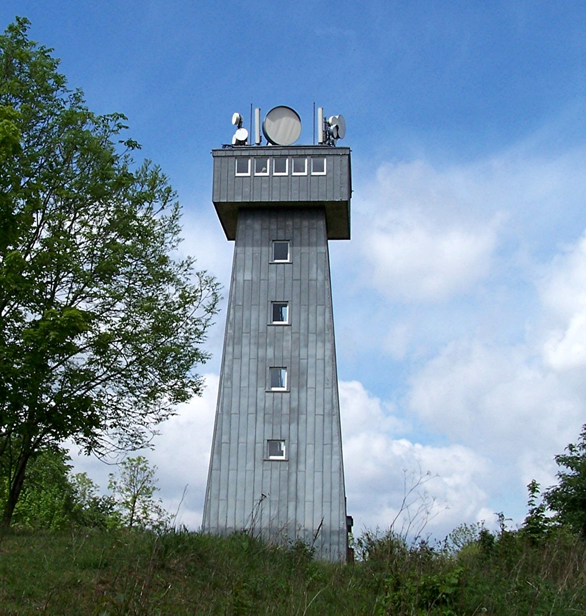 Der Neue Aussichtstum auf dem Berg Pleß (Rhön)